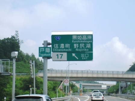 信濃町インターチェンジの案内板